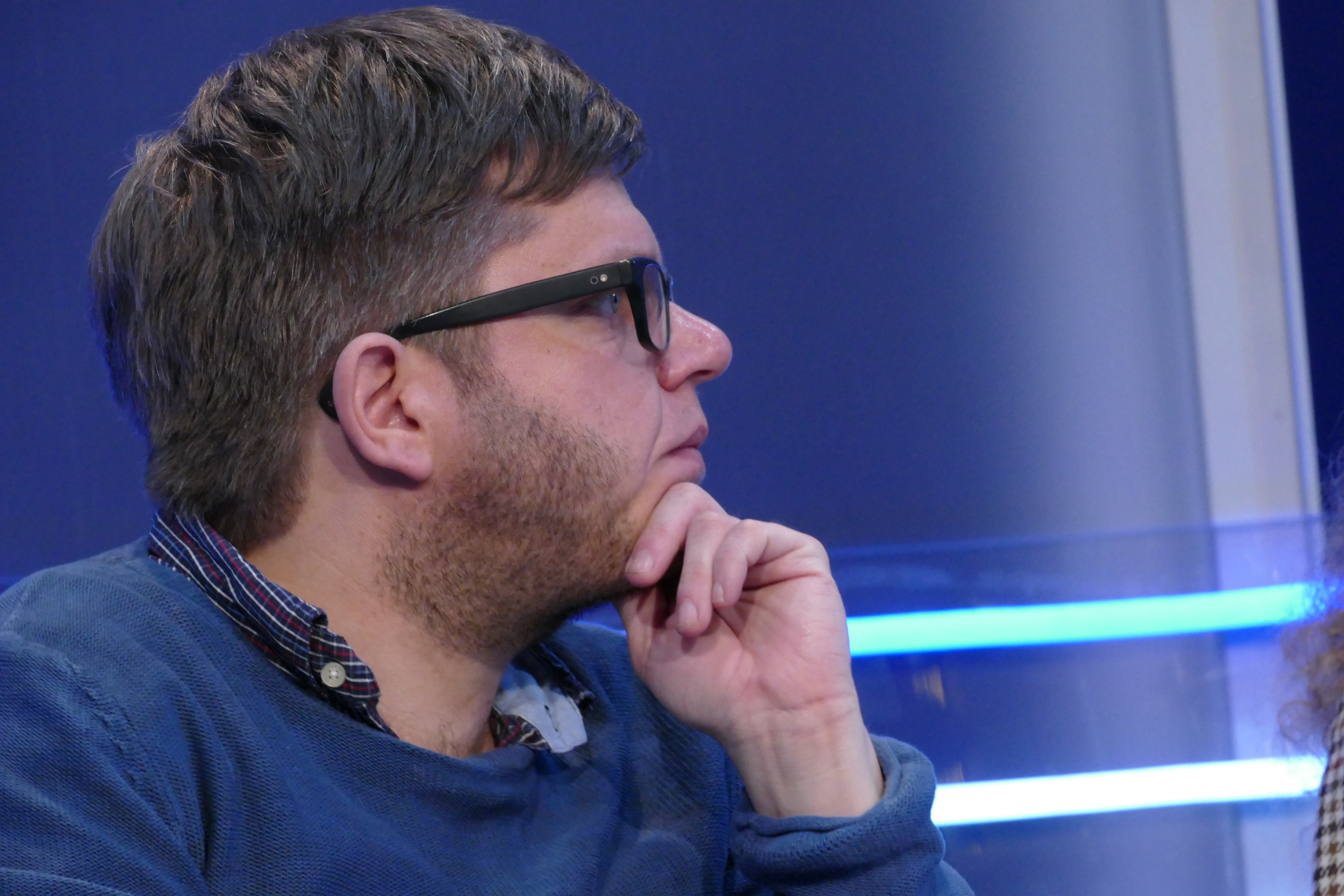 Martin Becker spricht auf der Leipziger Buchmesse über seinen Roman "Marschmusik"